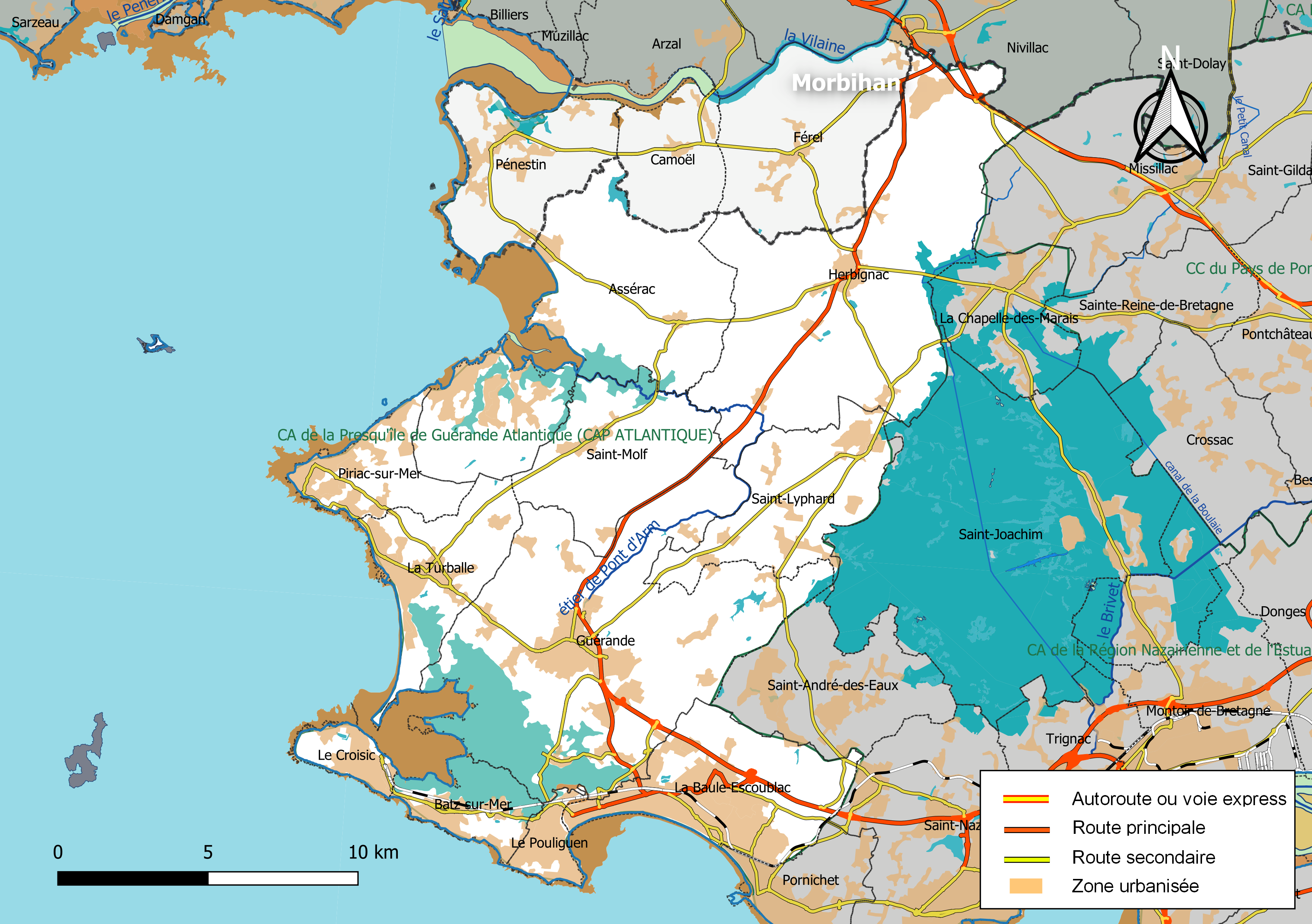 Carte géographique de la Communauté d'agglomération de la Presqu'île de Guérande Atlantique, département de la Loire-Atlantique, France. Composition au 1er janvier 2019.